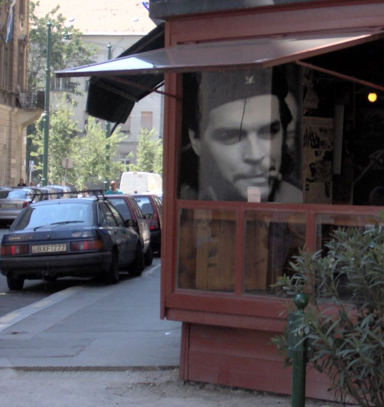 Kávéház a budapesti Wesselényi utcában Che poszterrel (VII. kerület)